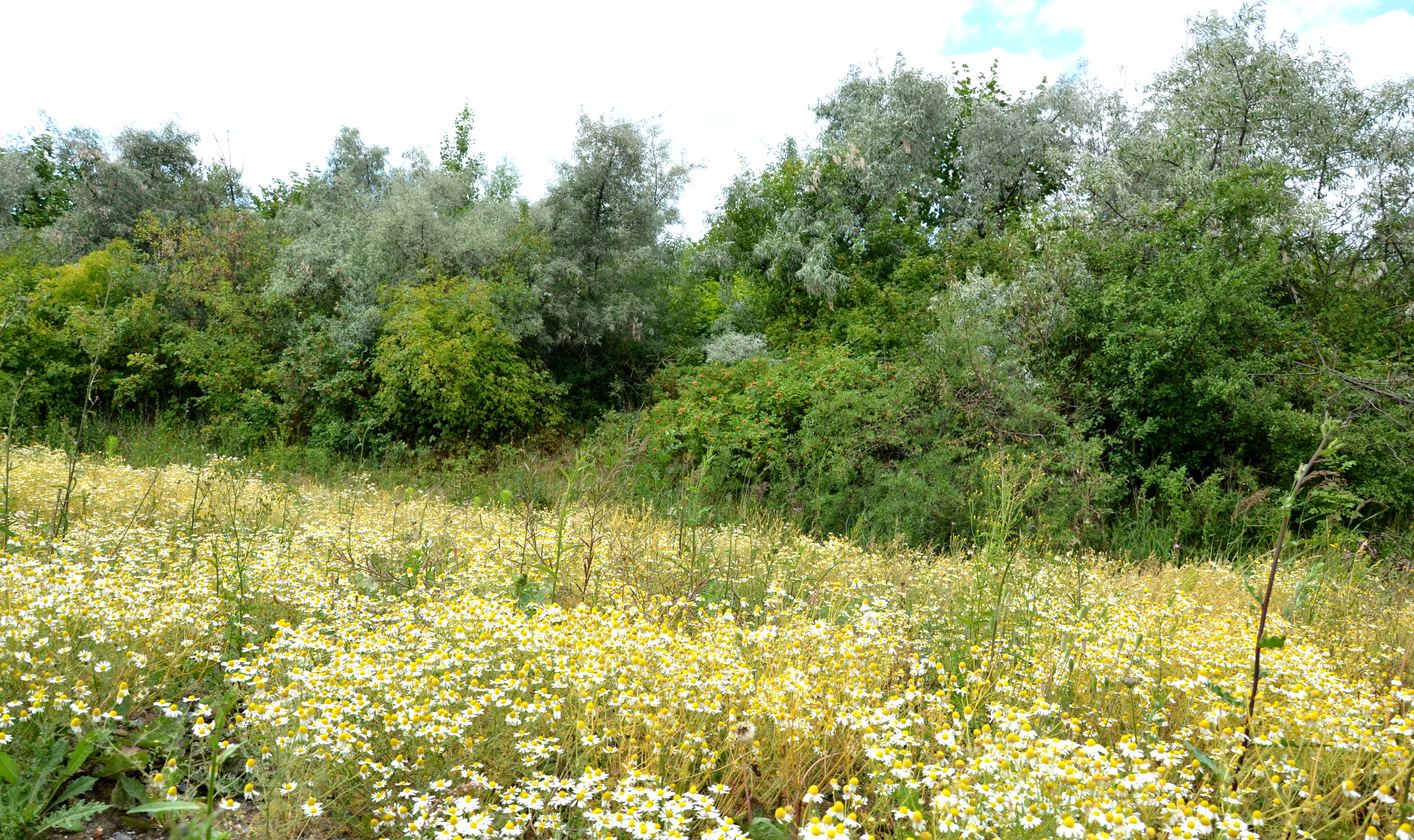 Tapis de fleurs sauvages (pionnières, sur sol fraichement remodelé) et haie dans la zone de l'Union, près du Canal de Roubaix